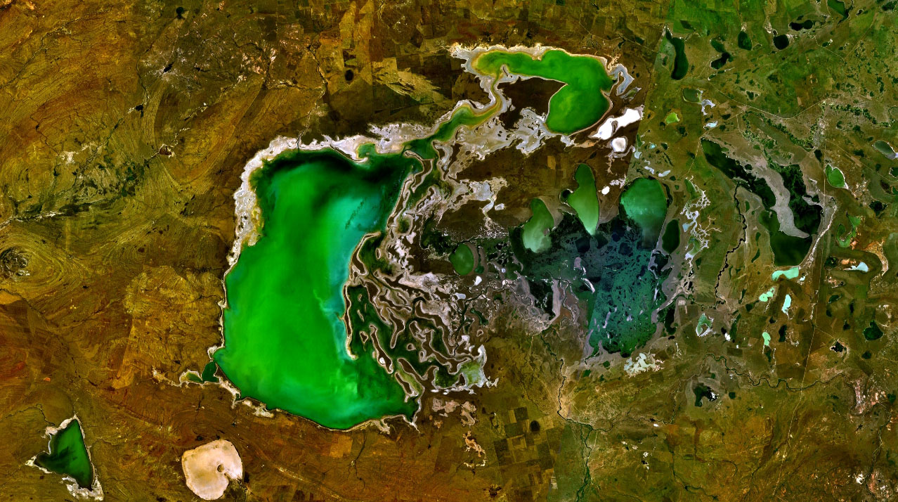 Lake Tengiz in Kazakhstan.